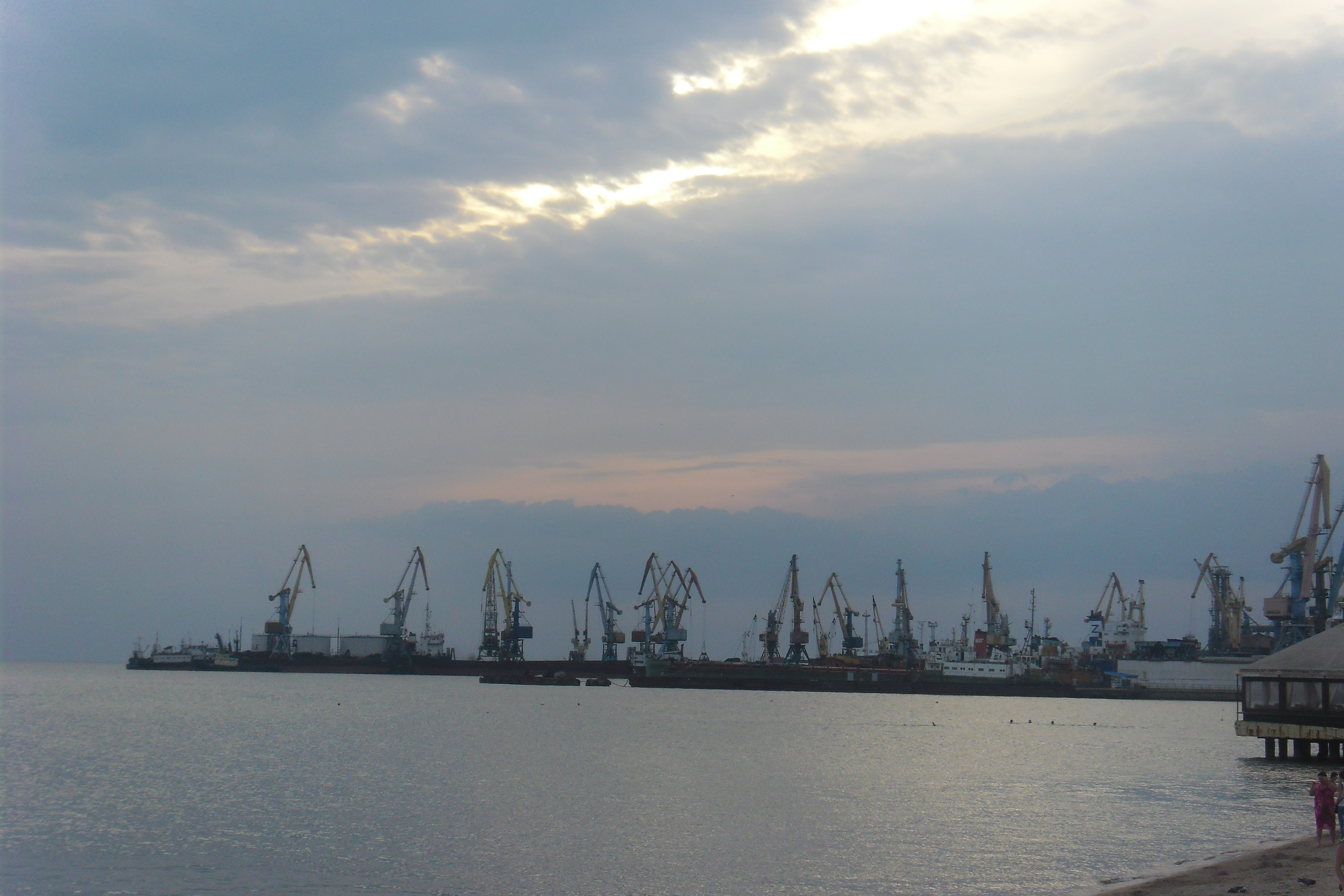 Запоріжжя-порт